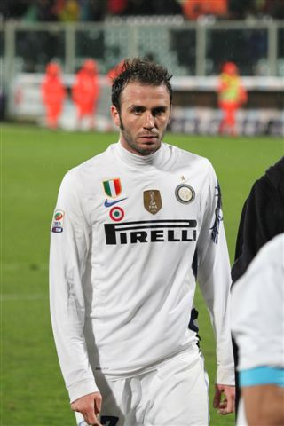 Giampaolo Pazzini (Pescia, 2 agosto 1984) è un calciatore italiano, qui con la casacca dell'Inter.